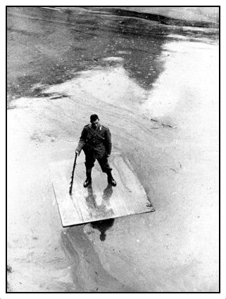 L’allievo sottufficiale dei Carabinieri, Antonio Randazzo, all’interno della Scuola (nel chiostro grande di “Santa Maria Novella”) sita in Piazza Stazione a Firenze, il 4 novembre 1966 si mette in salvo fortunosamente, salendo su una tavola vagante e tenendosi in equilibrio con un pezzo di legno capitatogli casualmente a tiro. Fotografato il 4 novembre 1966